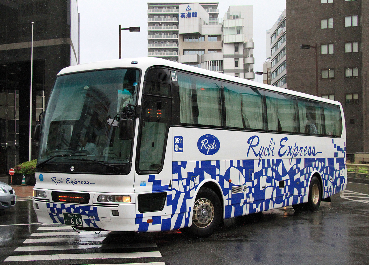 登録番号 岡山200か･669 社番：0511 両備ホールディングス㈱両備バスカンパニー岡山営業所所属 夜行高速用車両 2011年5月 福岡市中央区にて撮影 撮影者 Zondag2000